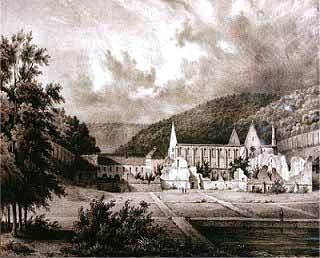 Lithographie du démenbrement de l'abbatiale du val des Choues (début XIX°)